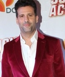 JMListorti